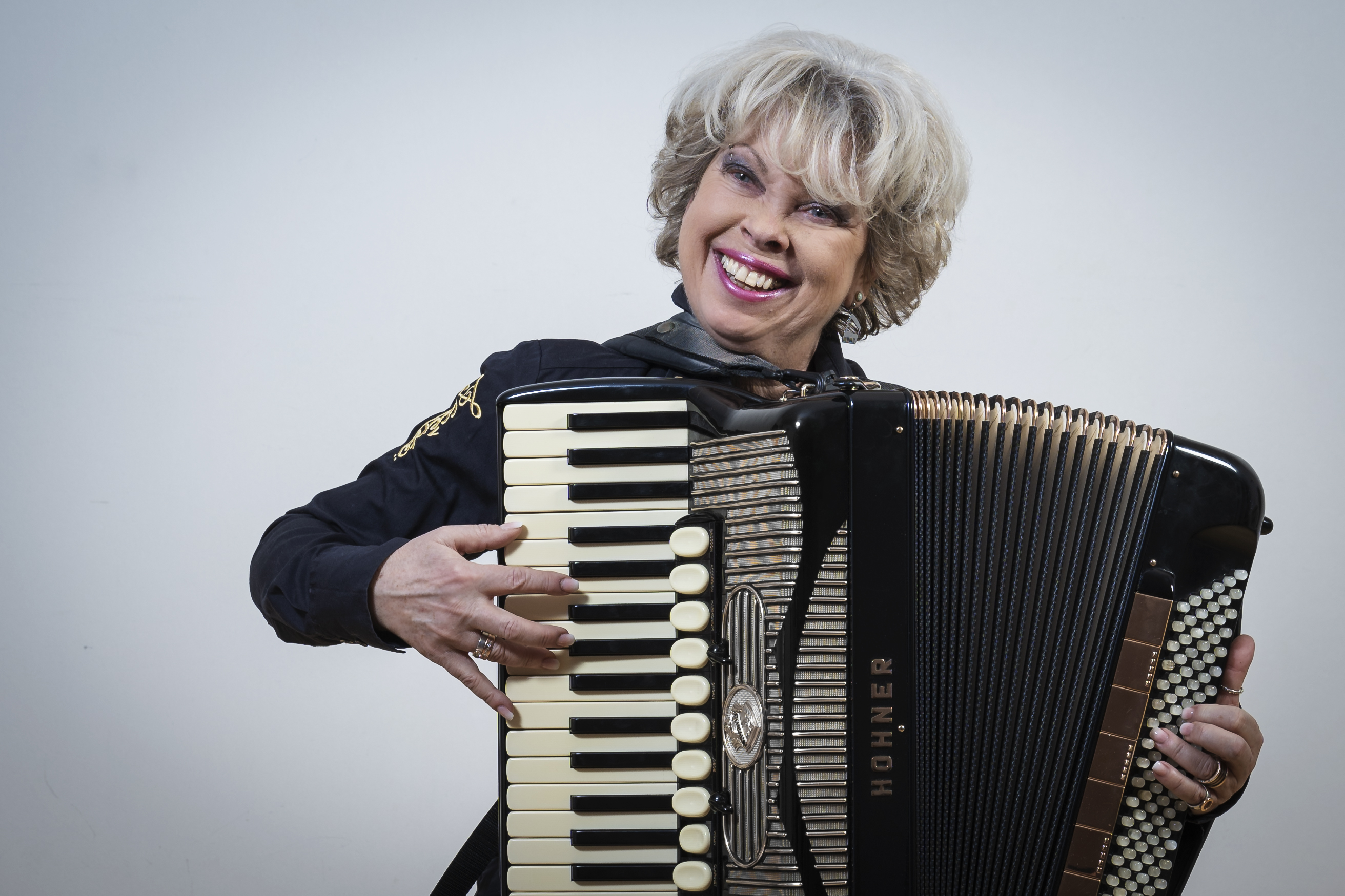 aktuelles Pressefoto